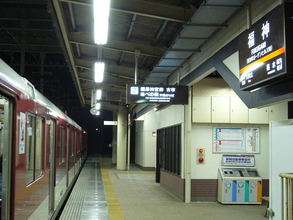 近鉄吉野線福神駅 2番ホーム